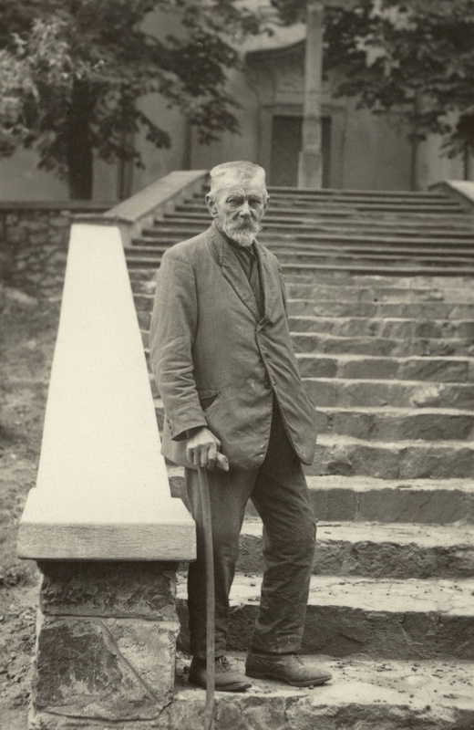 Josef Bosáček na Makové hoře, asi 1933